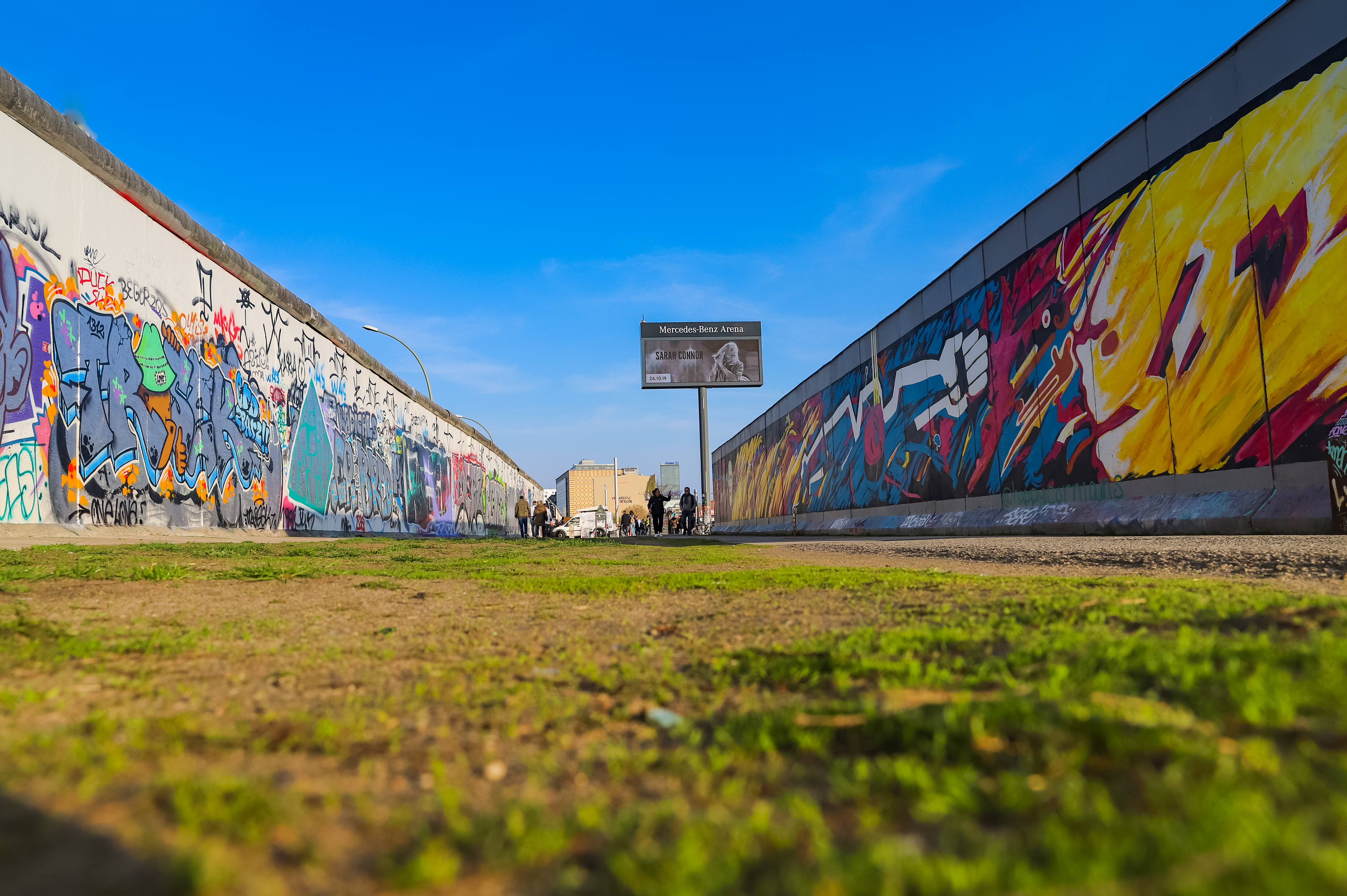 East Side Gallery, Berlin